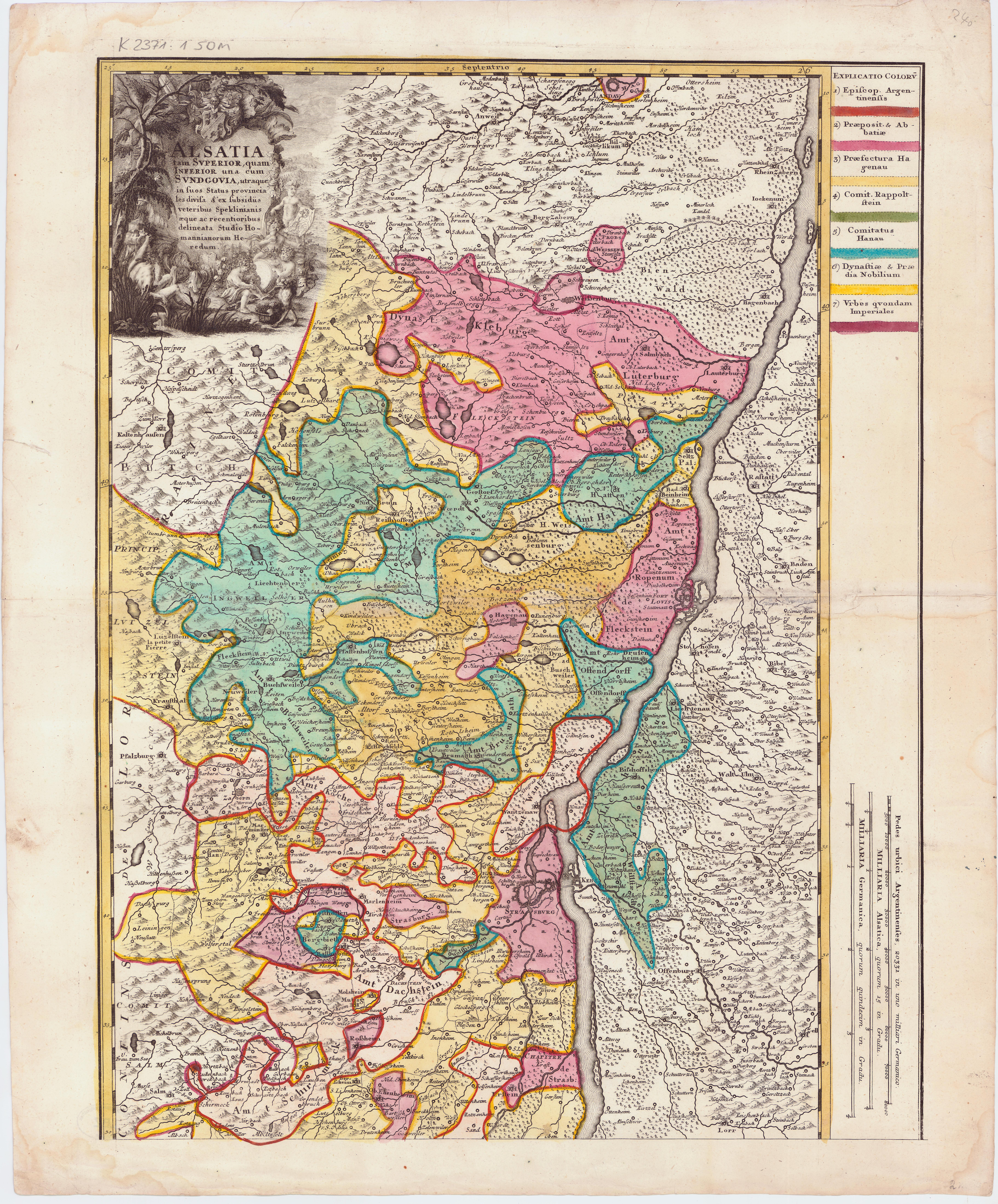 [Nürnberg] : 1744; [Electronic ed.] Koblenz : Landesbibliothekszentrum Rheinland-Pfalz, 2010.